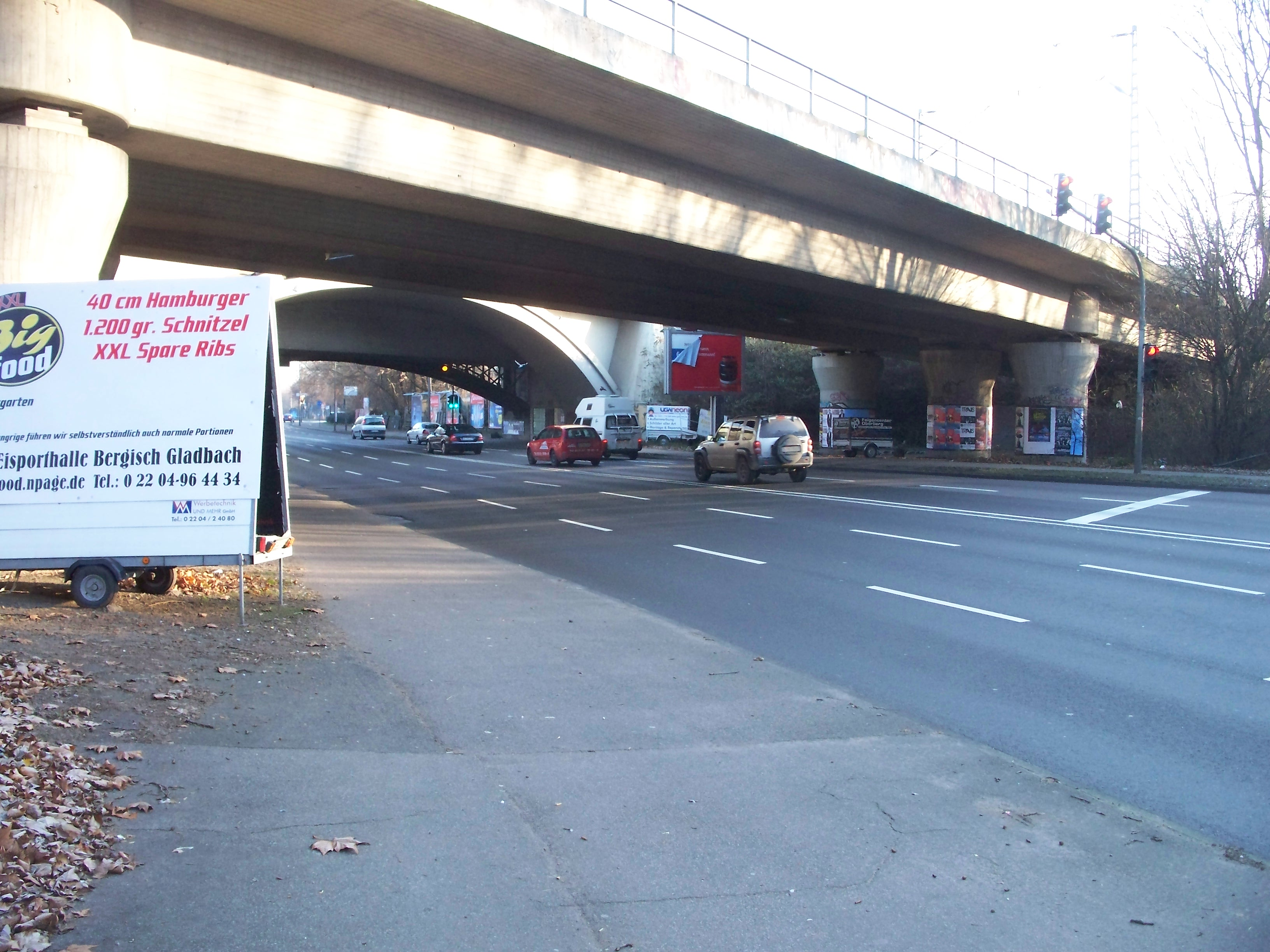 Überbreite Eisenbahnbrücke über die Innere Kanalstr